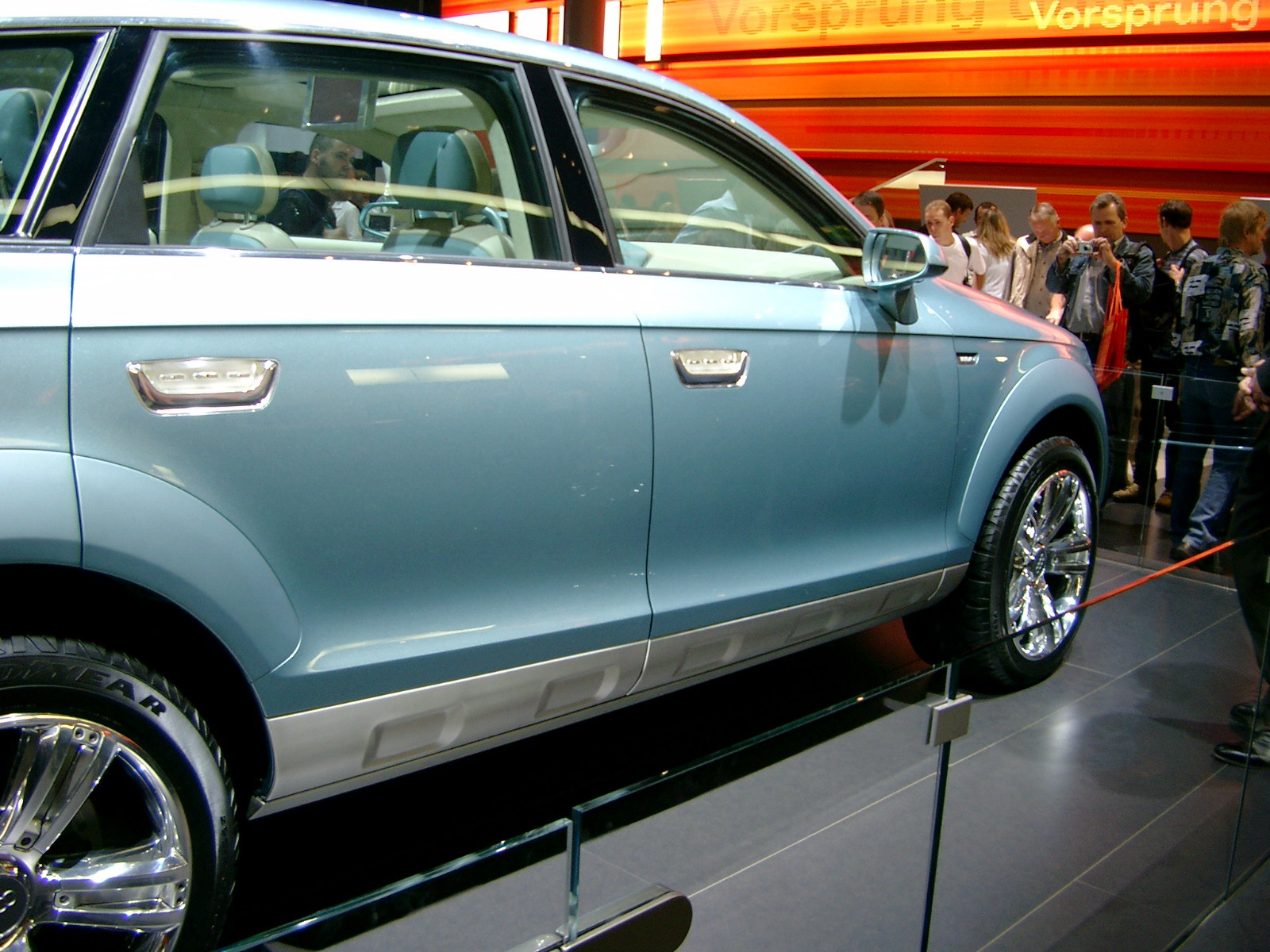 Audi Studie Pikes Peak auf der IAA Frankfurt 2003